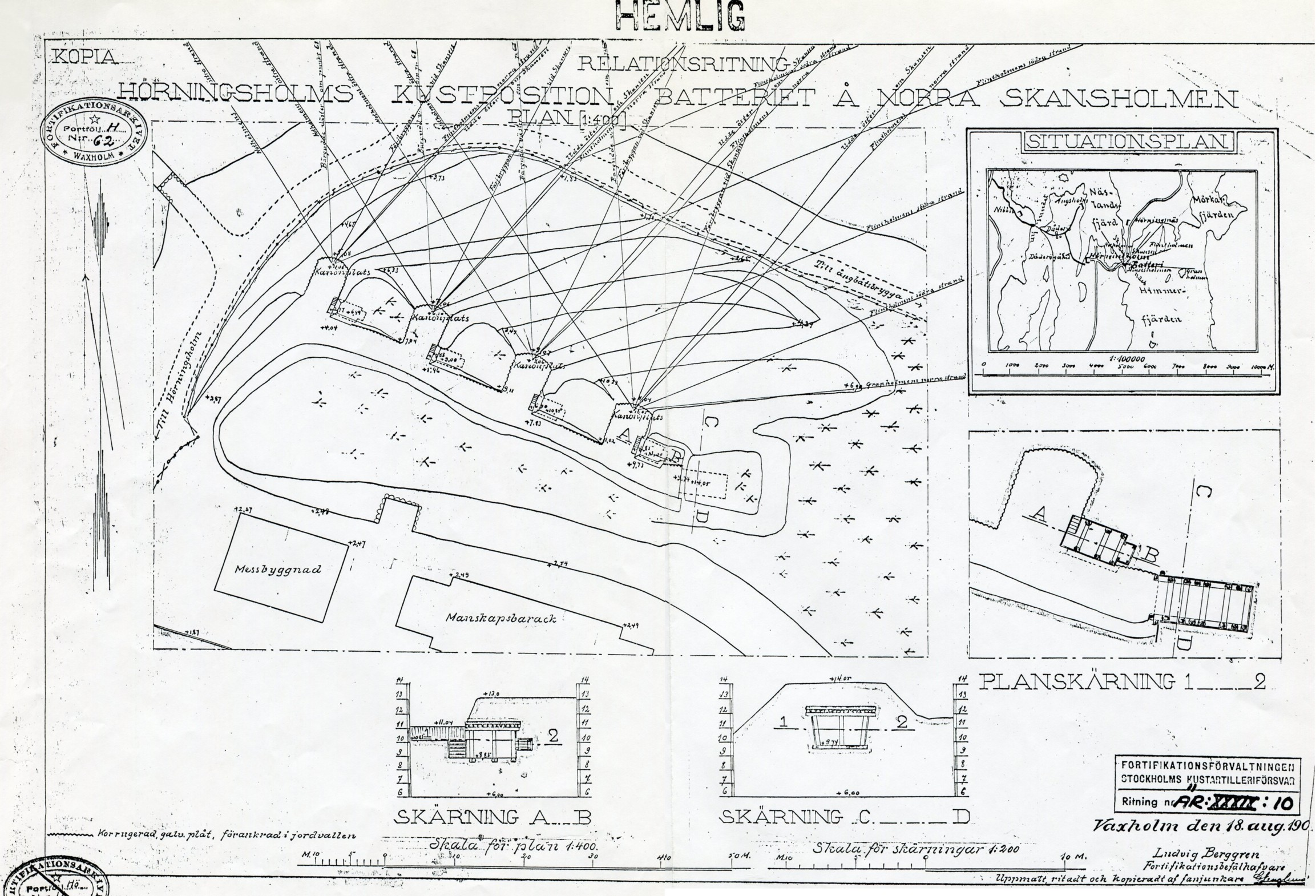 Relationsritning över Hörningsholms kustposition, batteriet å norra Skansholmen